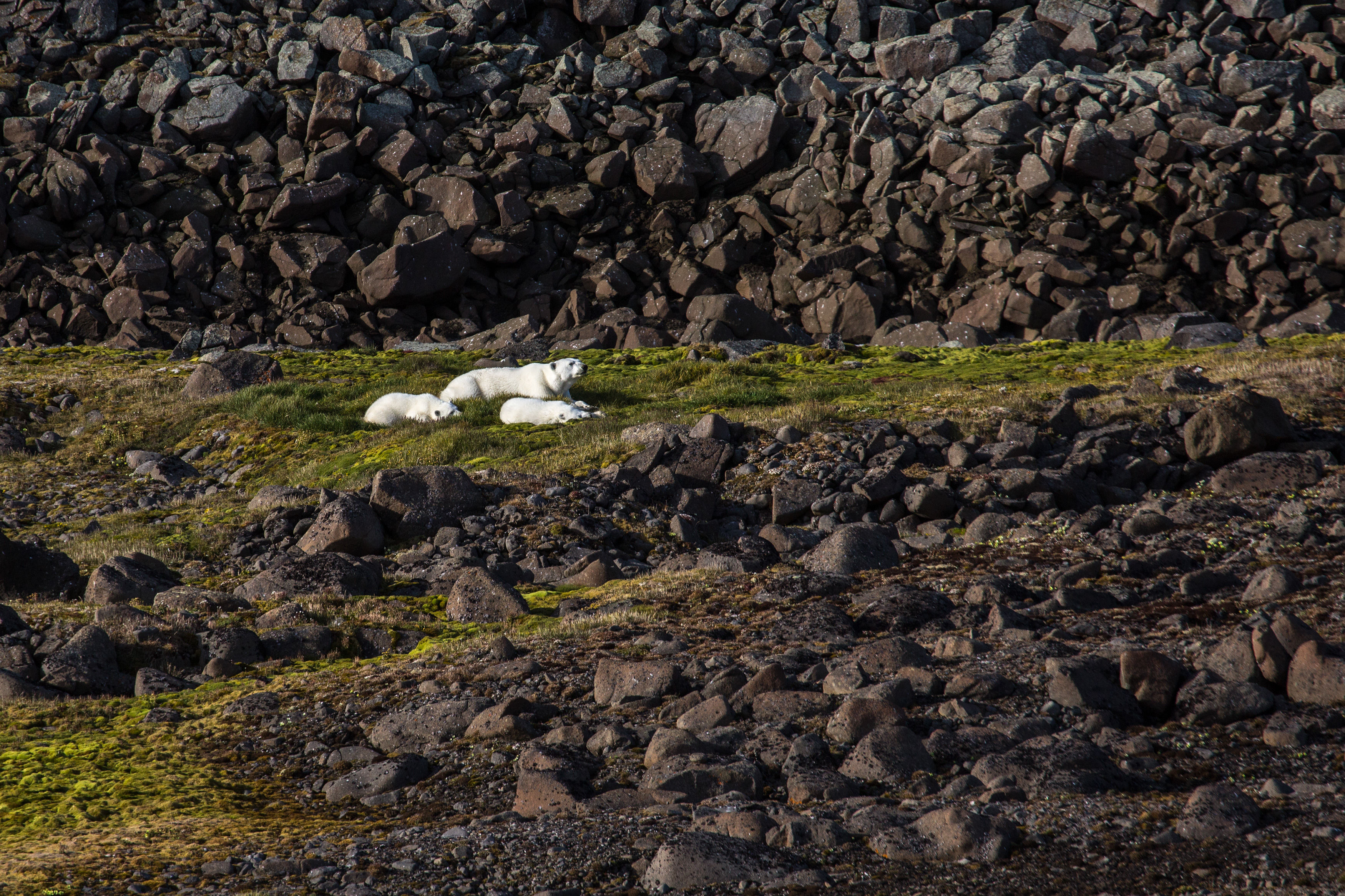 Белые медведи - мама и малыши на острове Гукера. Звери выбрали участок с редкой для этих мест зеленой травой и устроили отдых на мягкой теплой полянке. Комплексный заказник Земля Франца-Иосифа: Архангельск, Приморский район, Архангельская область. Снимок сделан в рамках экспедиции "По следам двух капитанов", организованный Ассоциацией "Морское наследие" проекта "Архипелаги Арктики: Открытый океан". This image is related to the protected area of Russia number 2930163